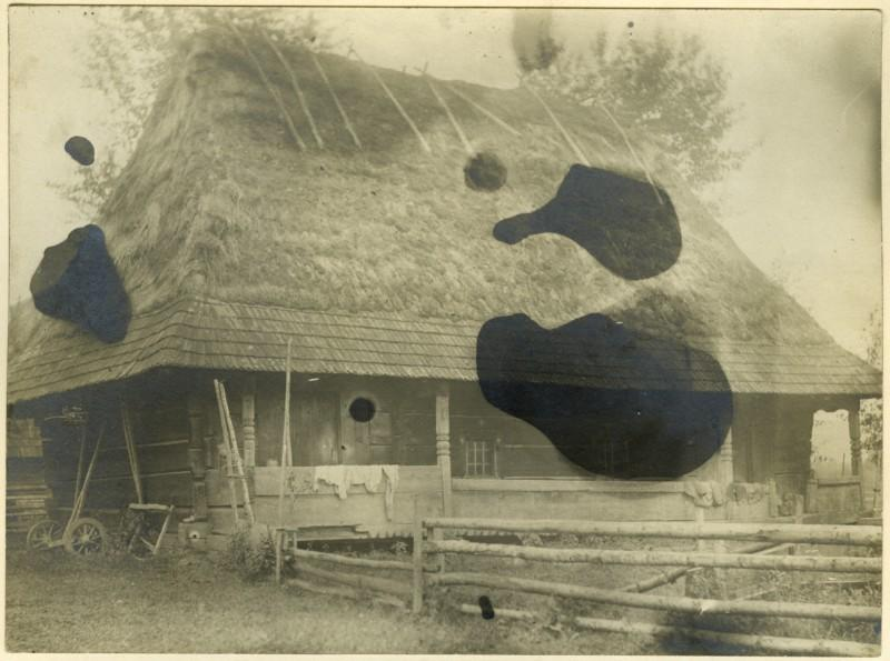 Хата в селі Маткові Турківського району.